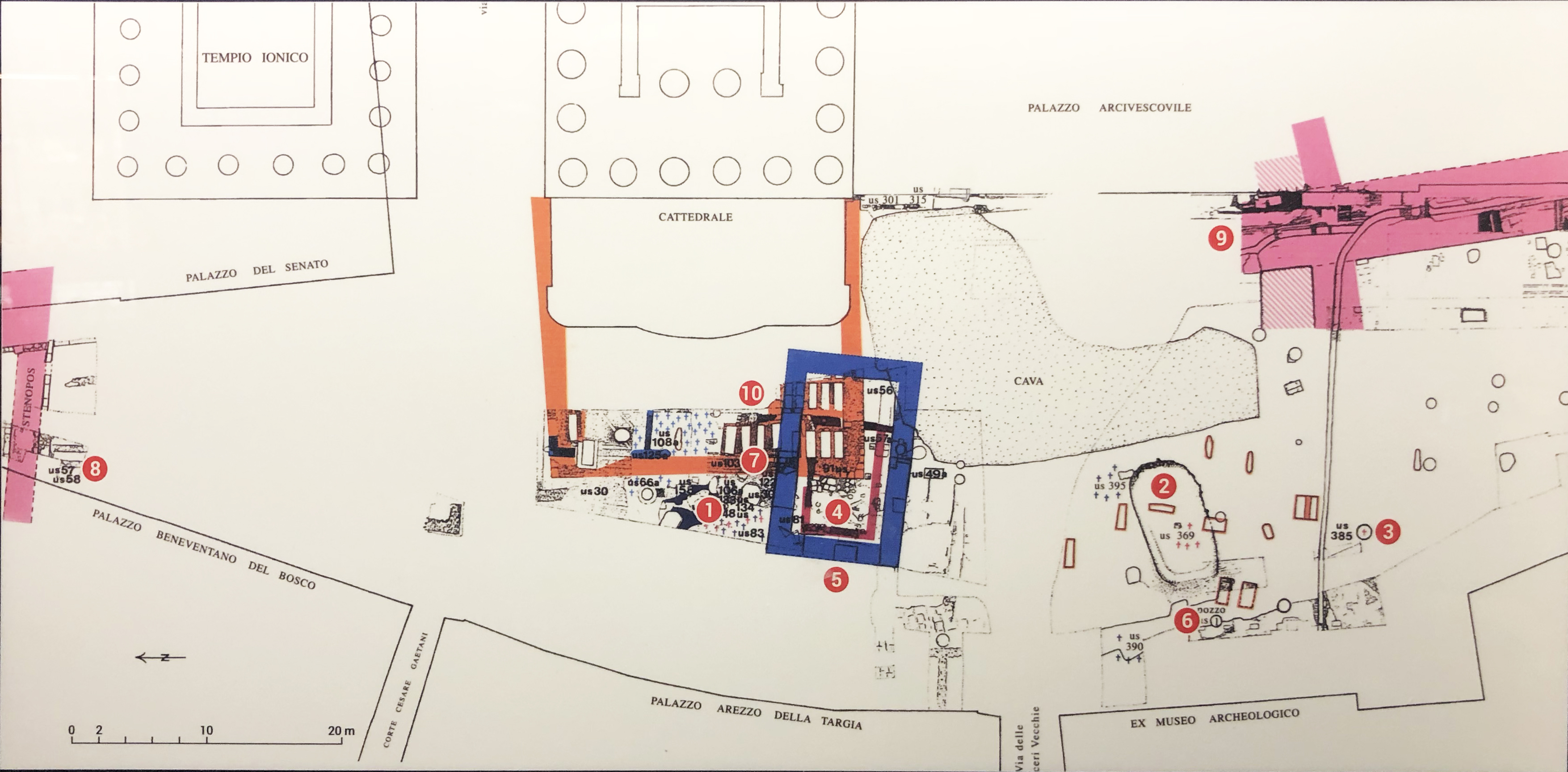 Ritrovamenti archeologici di Piazza Duomo, Siracusa